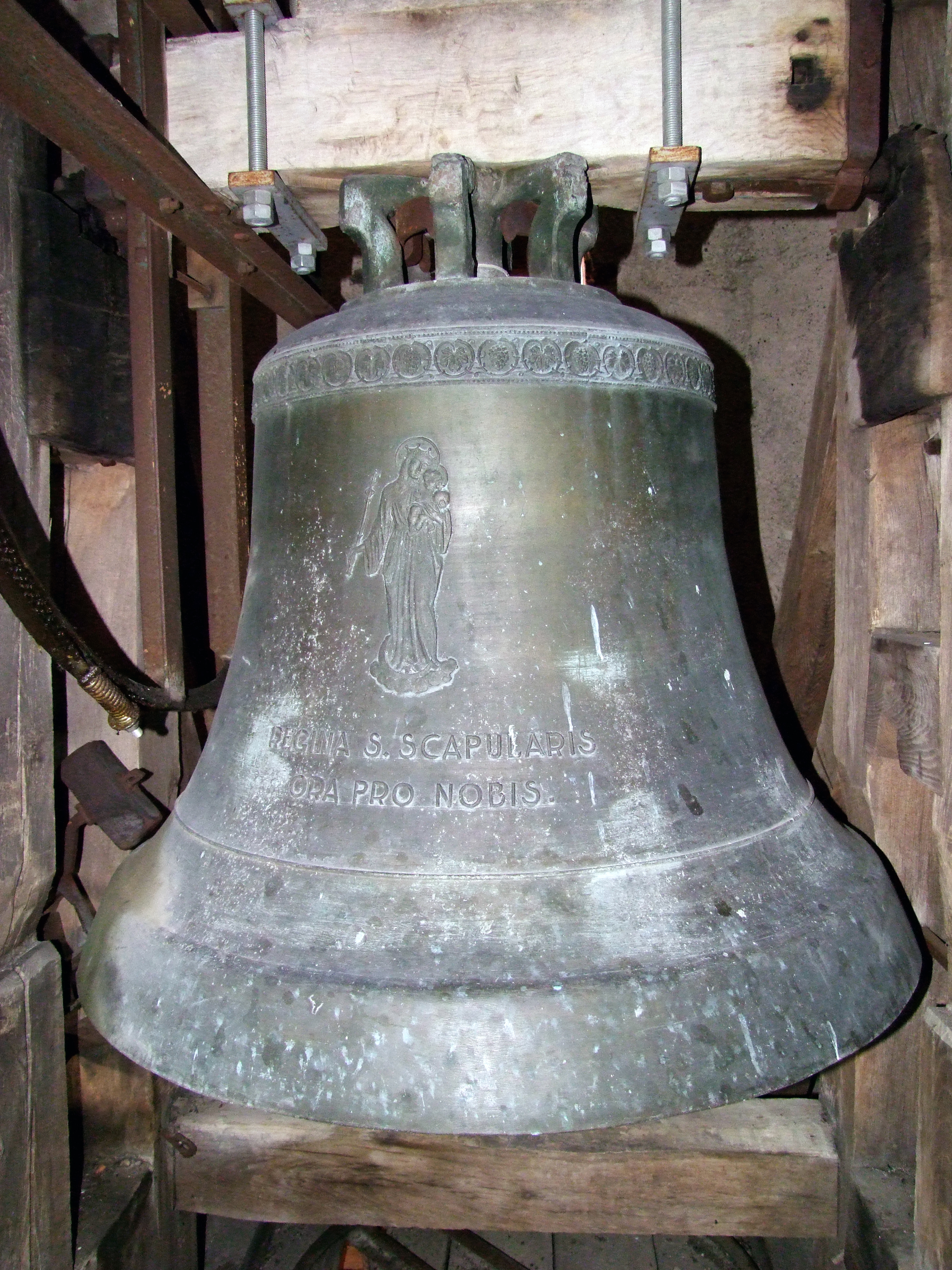 Wallfahrtskirche Mussenhausen "Unserer lieben Frau vom Berge Karmel"